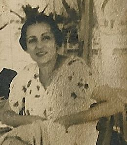 Η ζωγράφος Ελένη Πασχαλίδου-Ζογγολοπούλου (1933-1936)